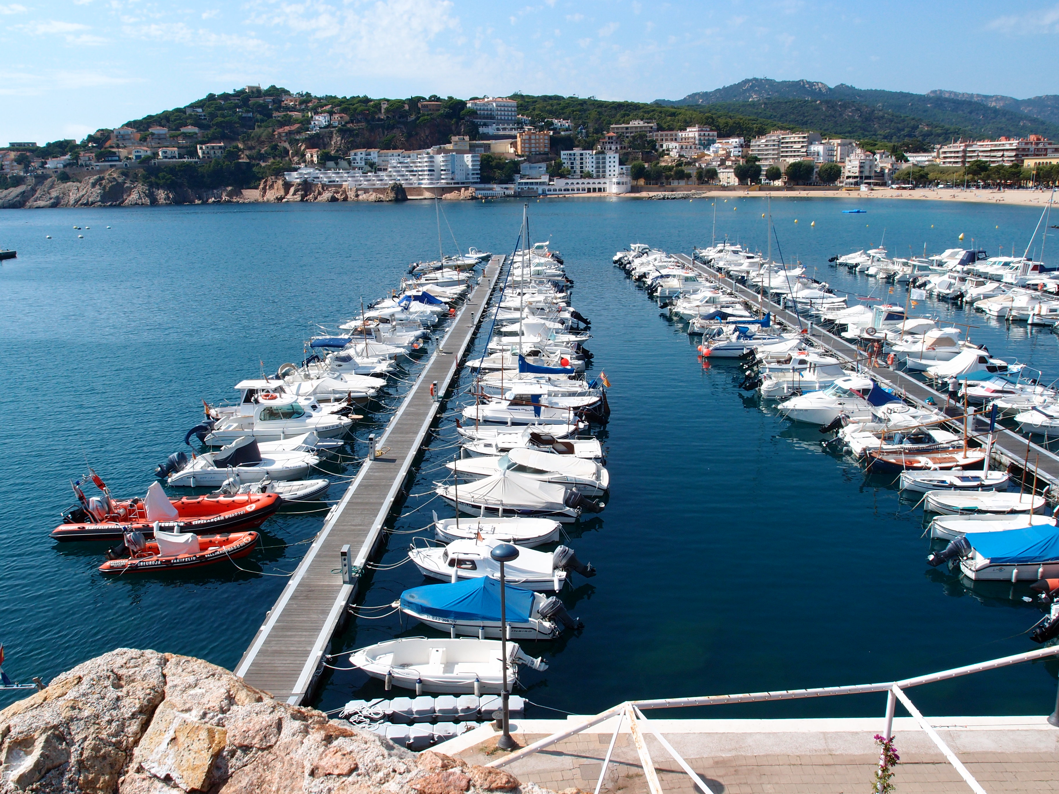 Sant Feliu de Guíxols- Sporthafen Datum: 22.09.2011 Urheber: M. Pfeiffer alias Benutzer:Gordito1869 Quelle: privates Fotoarchiv des Urhebers